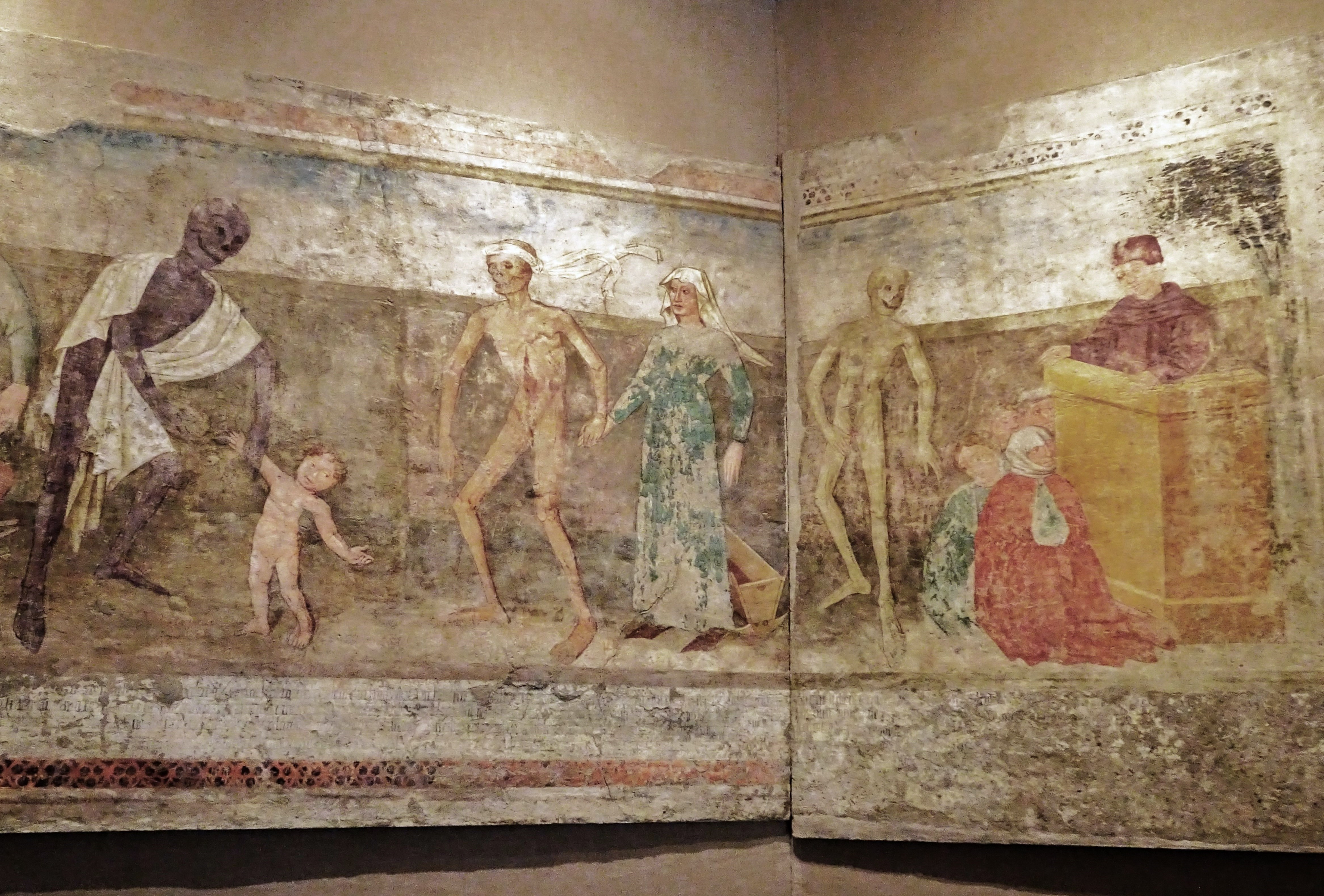 Teilansicht des vom Karner abgenommenen Totentanz-Freskos im Totentanz-Museum in Metnitz